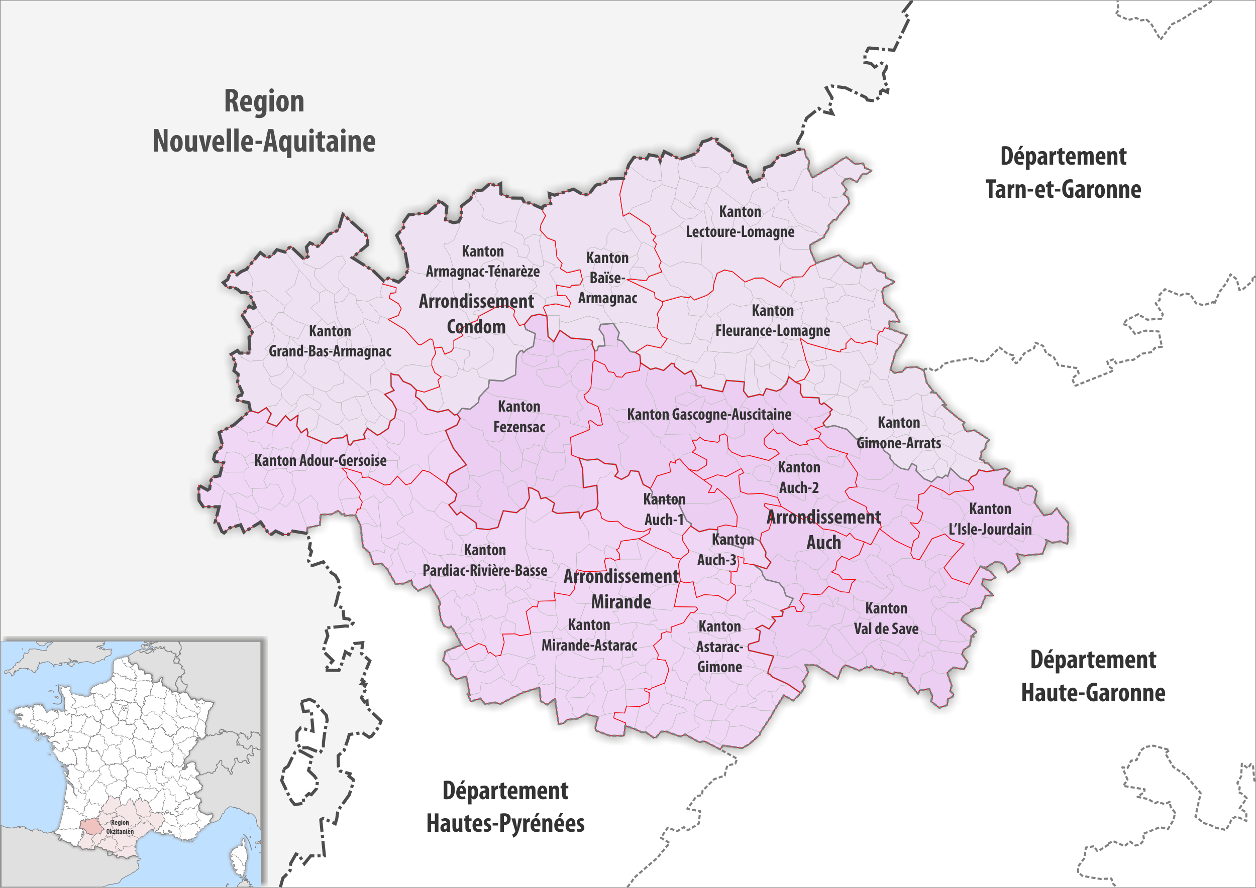 Gemeinden, Kantone und Arrondissemente im Departement Gers